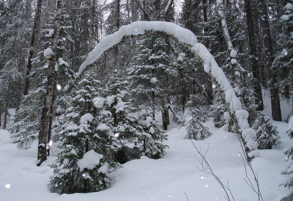 Taiga forest near Archangelsk, Russia